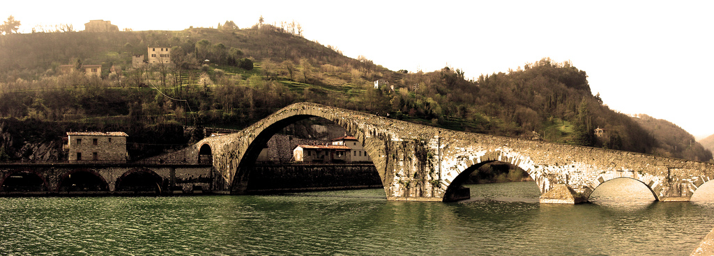 Ponte del Diavolo also known as "Ponte della Maddalena" in Borgo a Mozzano, Lucca, Tuscany, Italy.